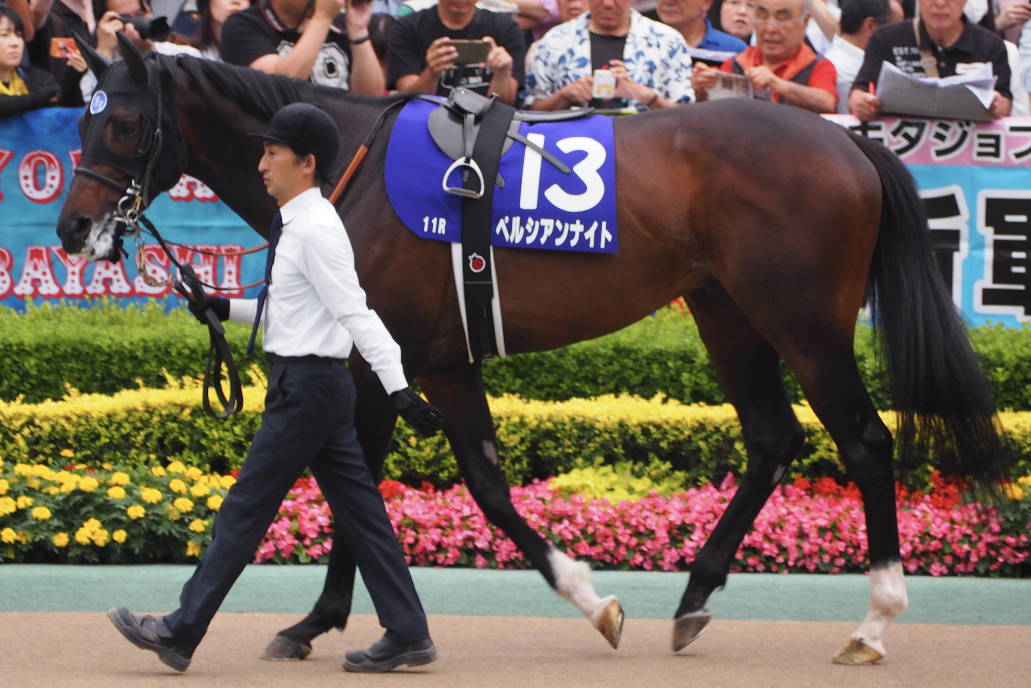 安田記念 パドック 2019